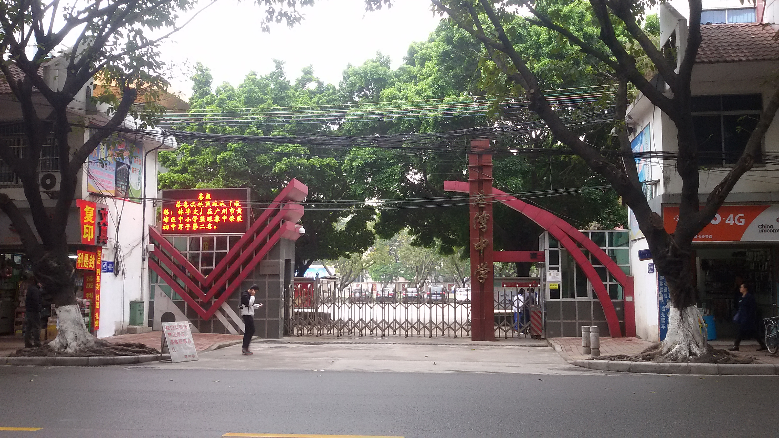 粵語: 黄埔区港湾中学嘅正门